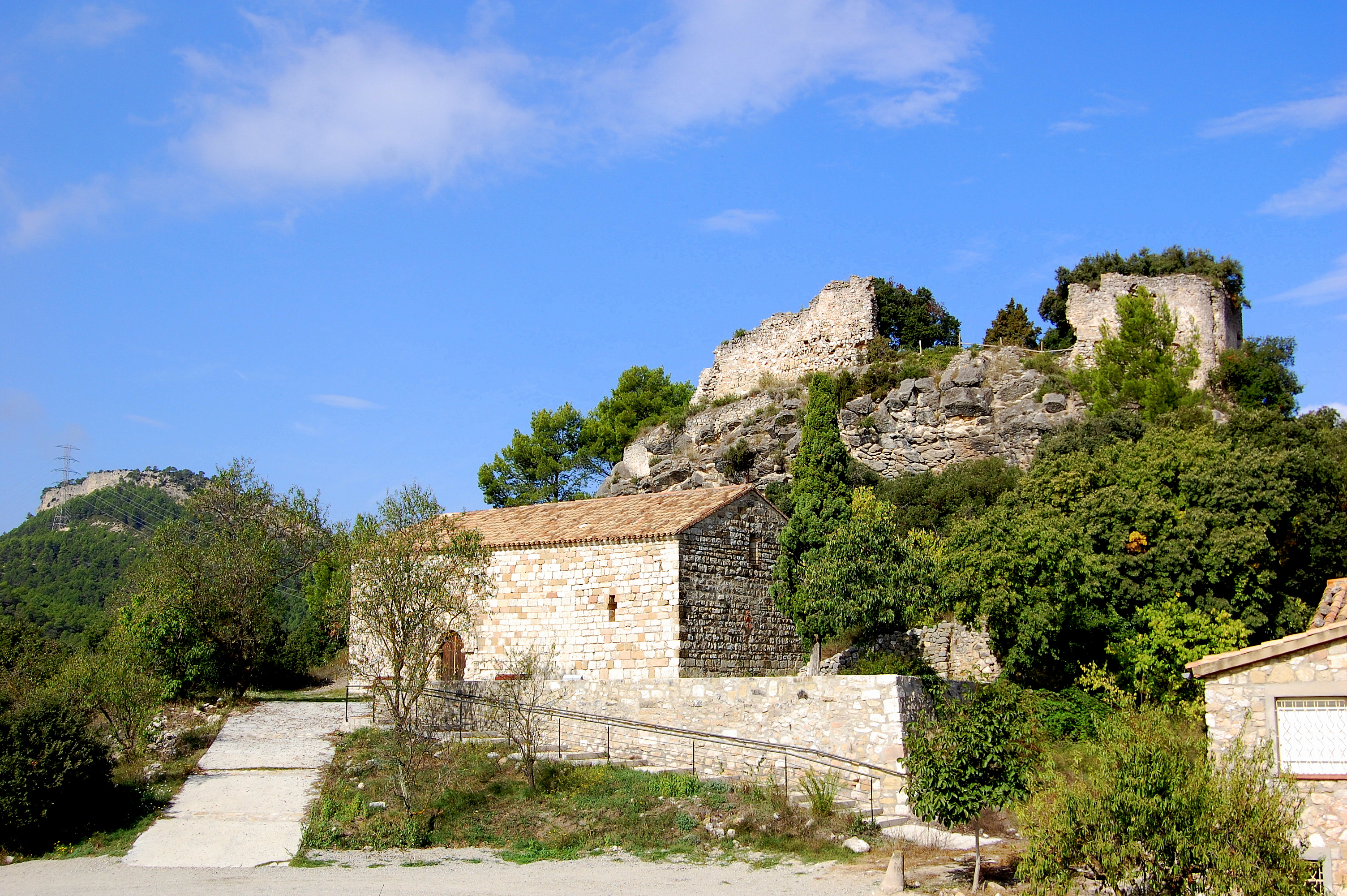 Castell de Miralles (Santa Maria de Miralles)